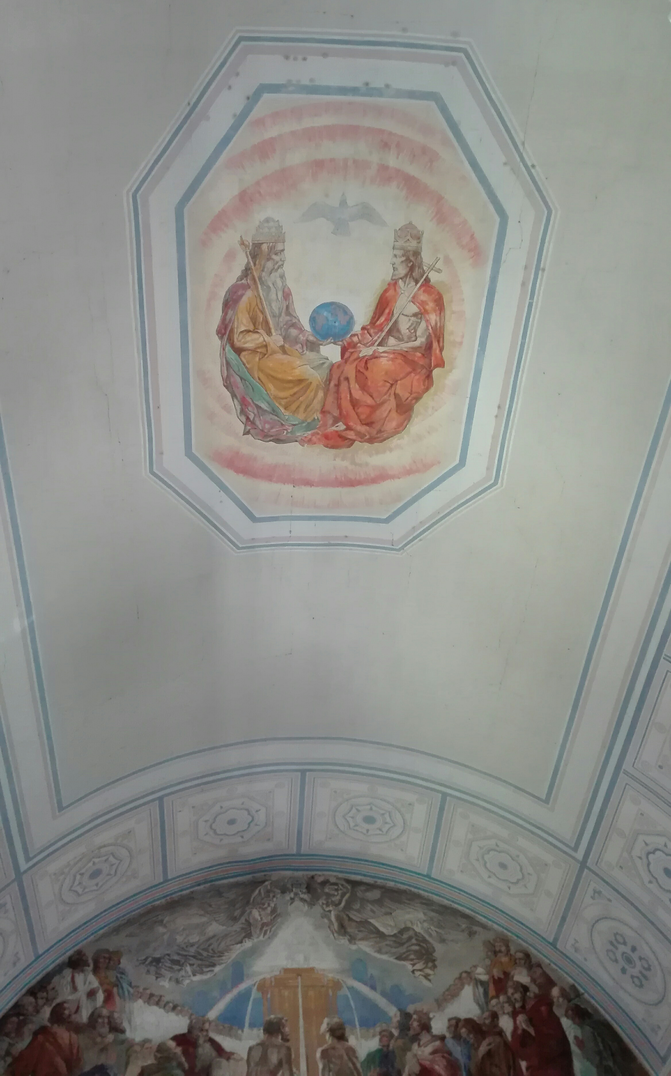 Šilutės evangelikų liuteronų bažnyčios lubų freska